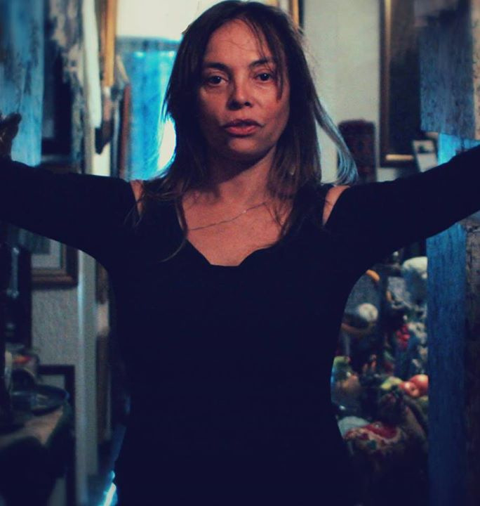 Premio Nacional de Artes Plásticas